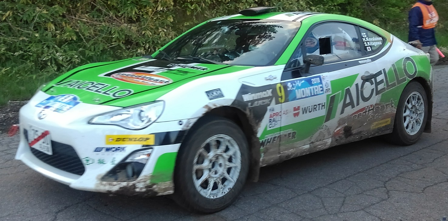 2019年ラリー・モントレーにて、APRC/JSRでヘイキ・コバライネン/北川紗衣組がドライブするGT86 CS-R3